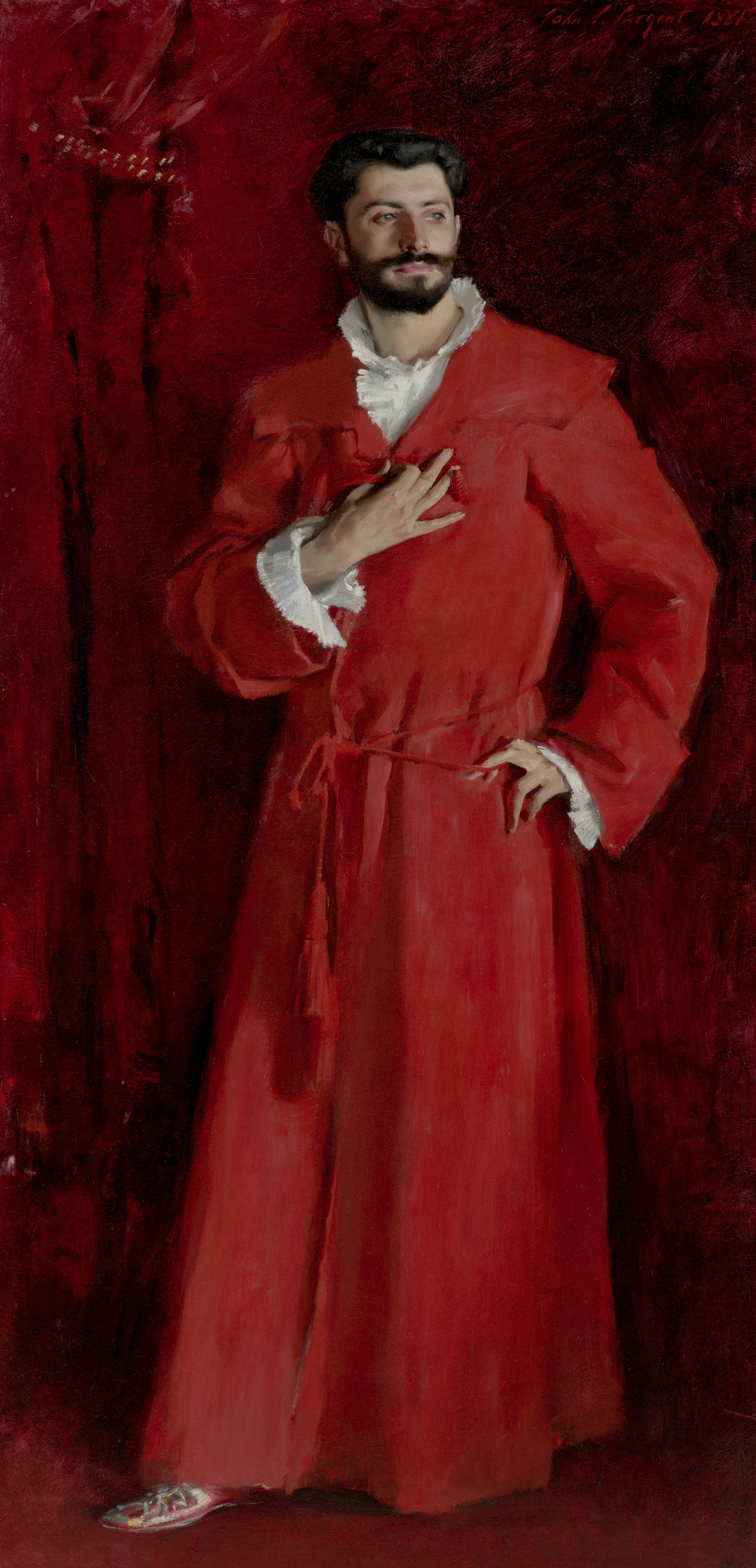 Samuel Pozzi chez lui Portrait par John Singer Sargent (1856-1925)